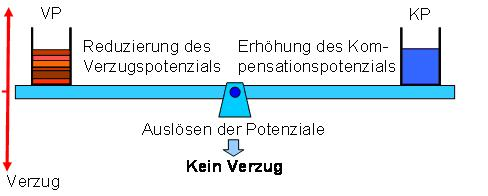 Ausgleich von Verzugspotential und Kompensationspotenzial